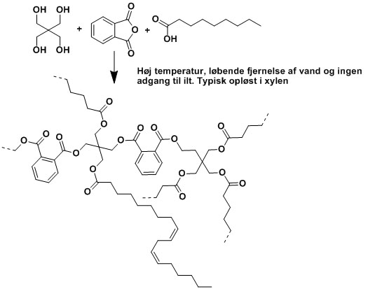 Syntese af alkyd